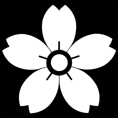 「山桜」紋（染抜）